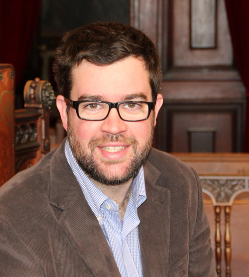 Foto de Antoni Noguera